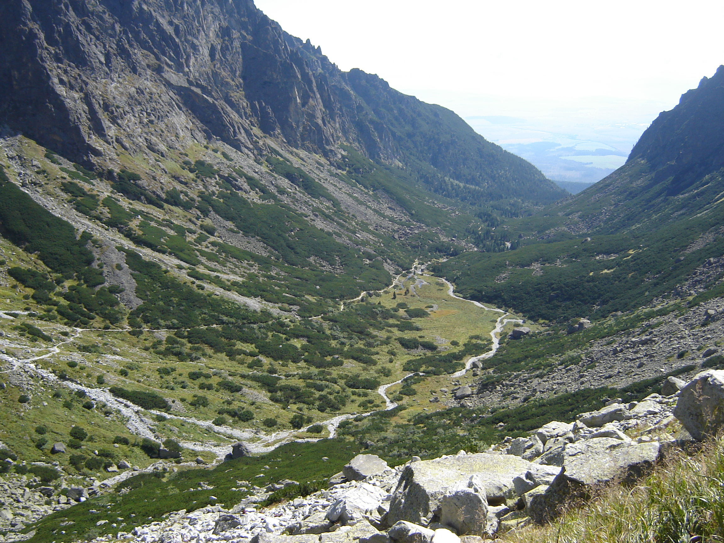 Malá Studená dolina